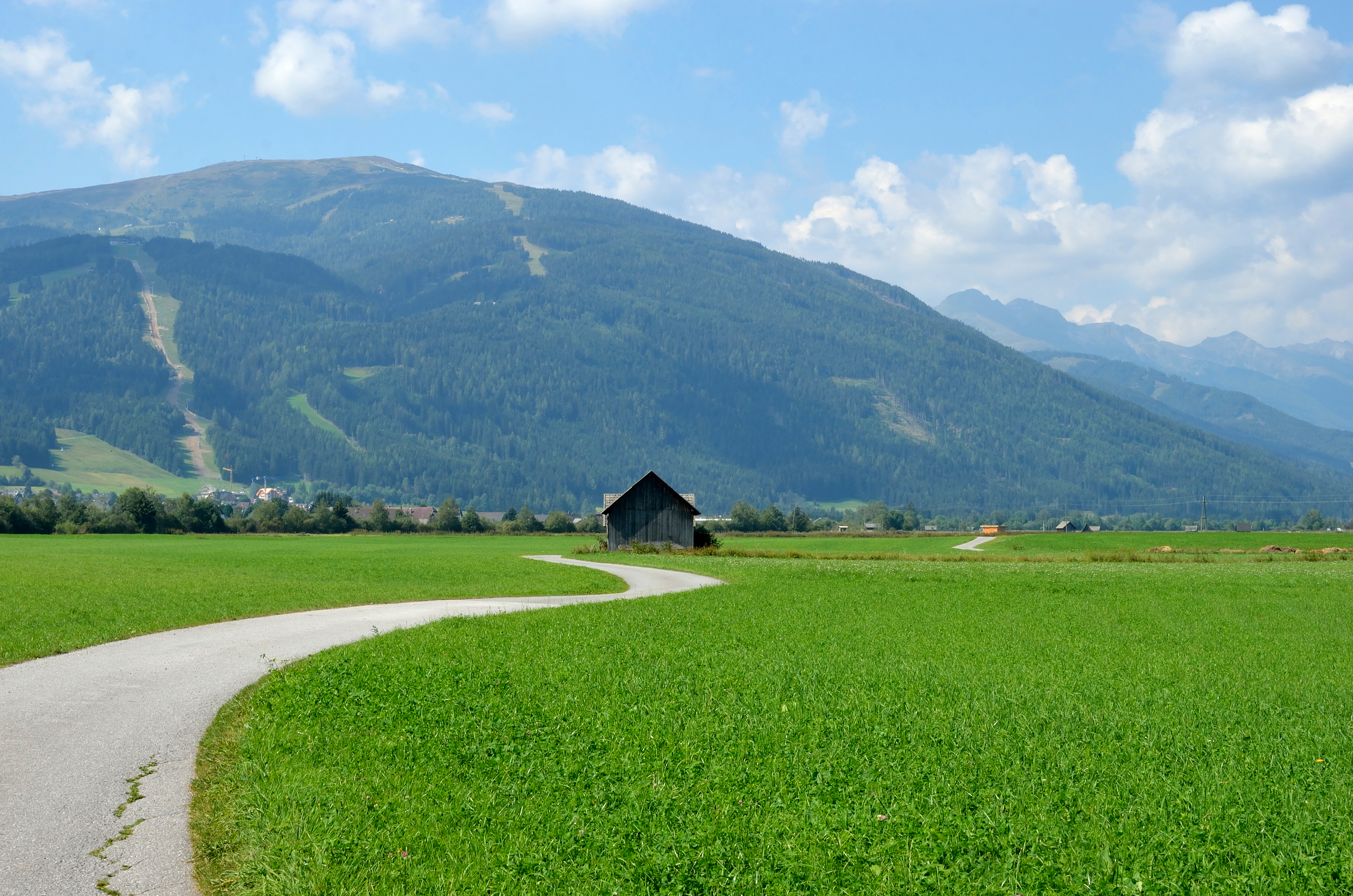 Zwischen Sankt Margarethen im Lungau und Tamsweg führt der Murradweg flach durch den Talboden. Hier der Blick nach SW zum Aineck (2210m)